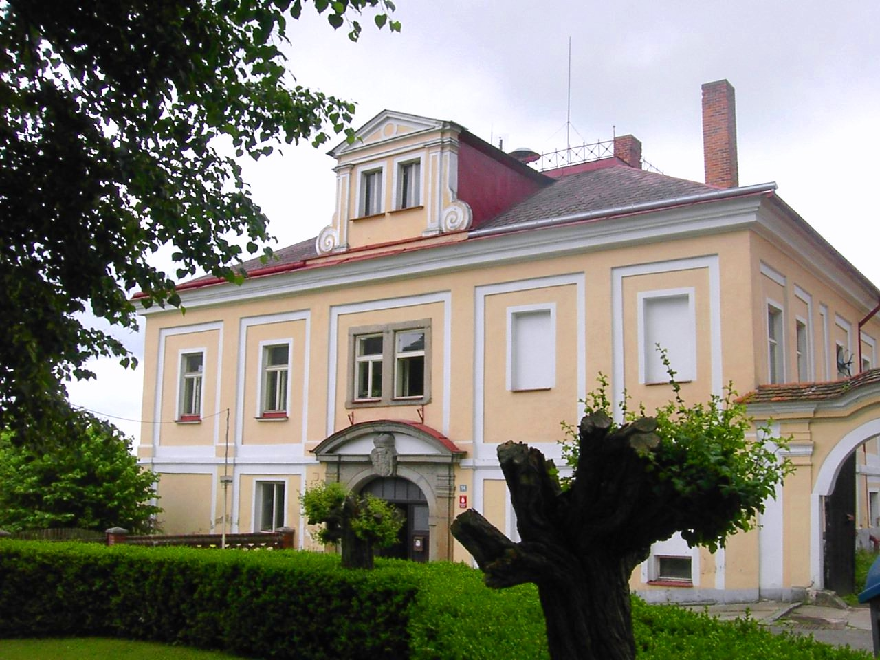 Obecní úřad ve Vysokom Chlumci.